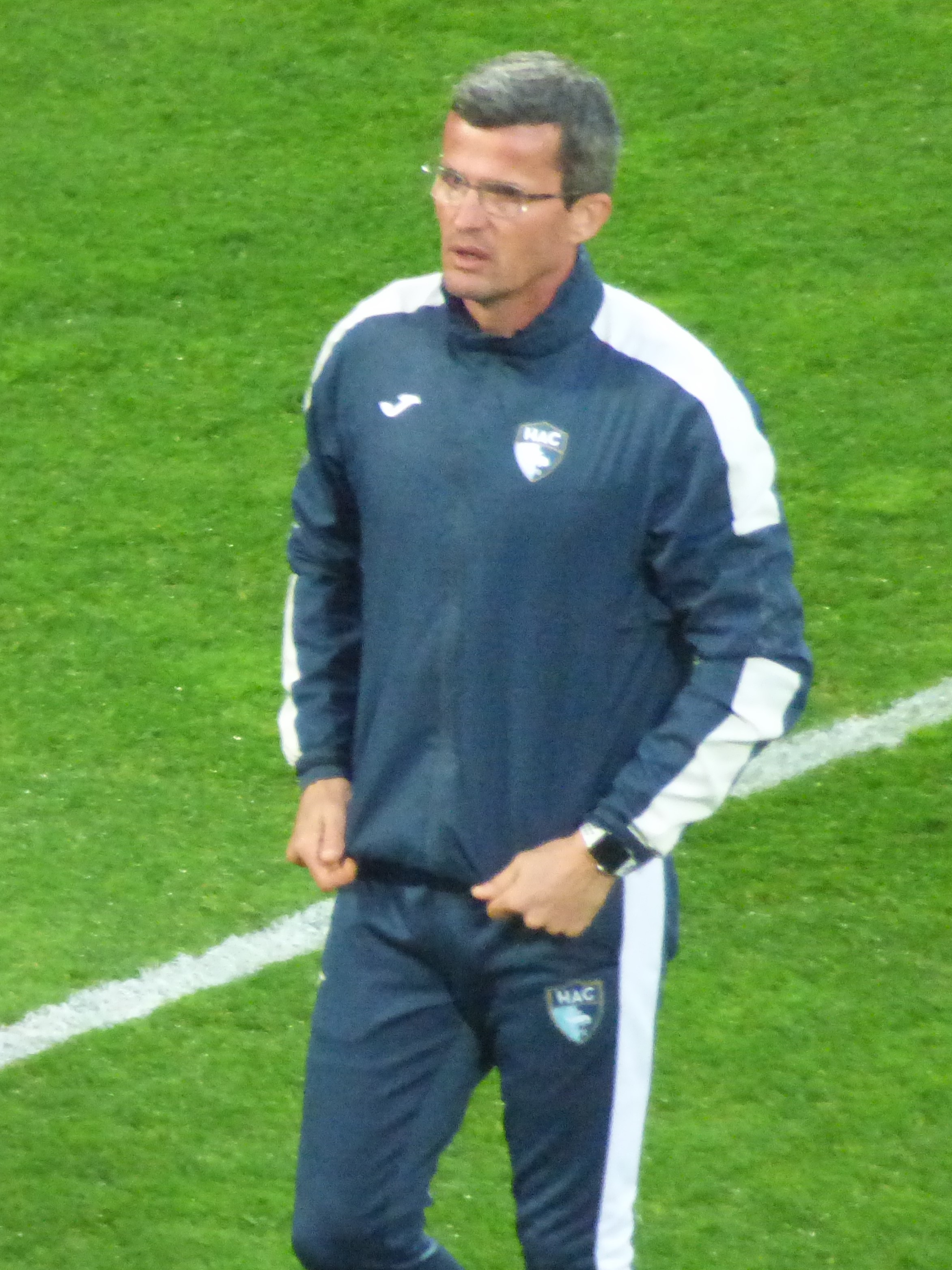 Frédéric Guéguen avant le match Lens / Le Havre, comptant pour la 30ème journée du championnat de France de Ligue 2 2018-2019, le 1er avril 2019 au Stade Bollaert-Delelis.